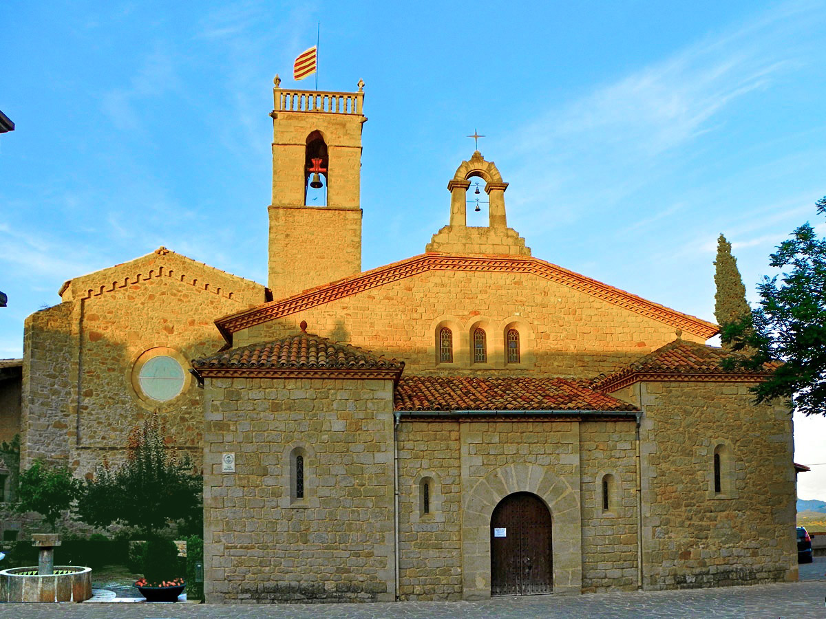 Façana de l'església de Sant Feliu Sasserra.